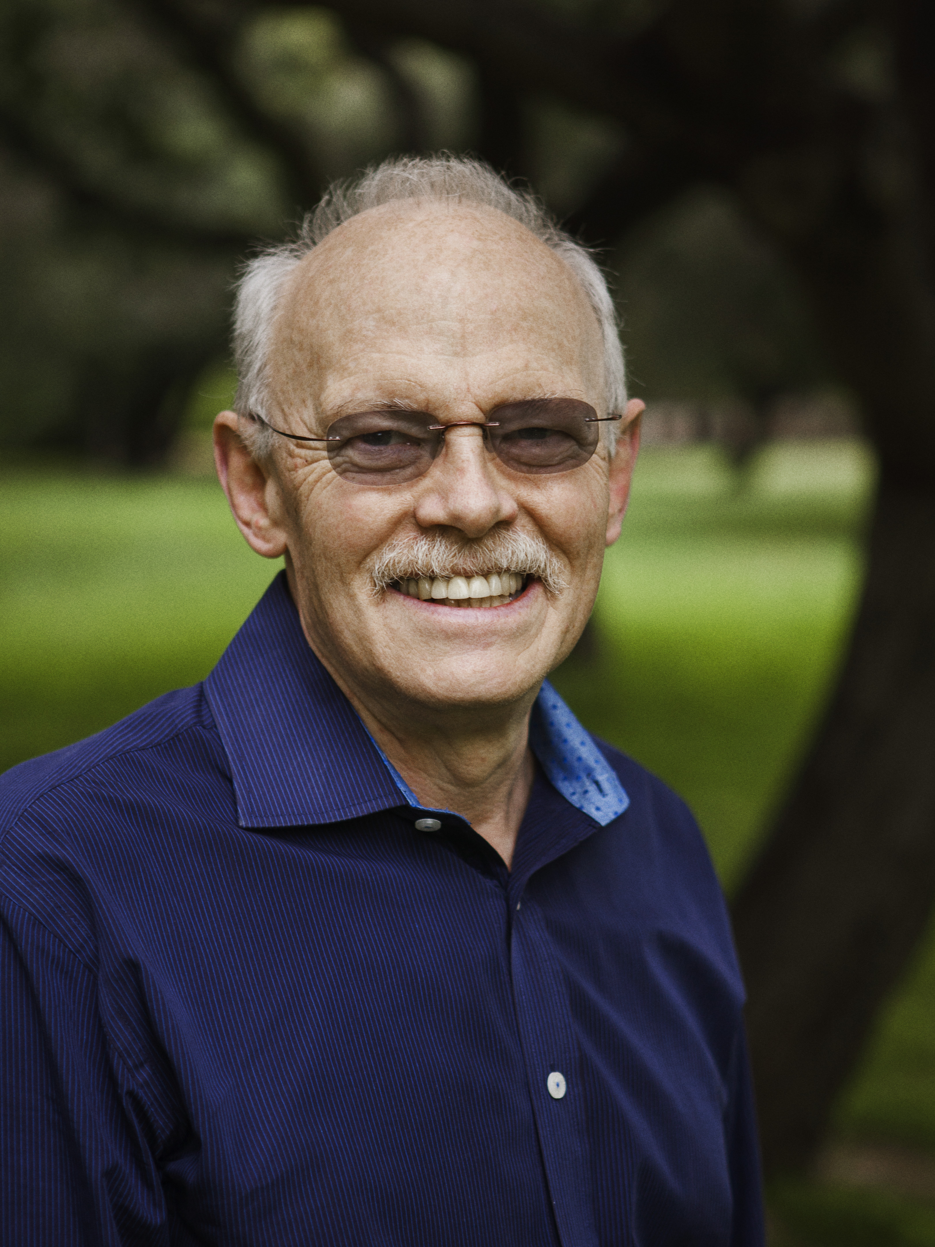 James McClelland, directeur van het Center for Mind, Brain, and Computation aan de Universiteit van Stanford (Verenigde Staten), krijgt de C.L. de Carvalho-Heinekenprijs voor de Cognitiewetenschap 2014 voor zijn grote en fundamentele bijdrage aan het gebruik van neurale netwerken voor het modelleren van cognitieve hersenprocessen. Bij gebruik van de foto's is naamsvermelding van de fotograaf verplicht: Jussi Puikkonen/KNAW.